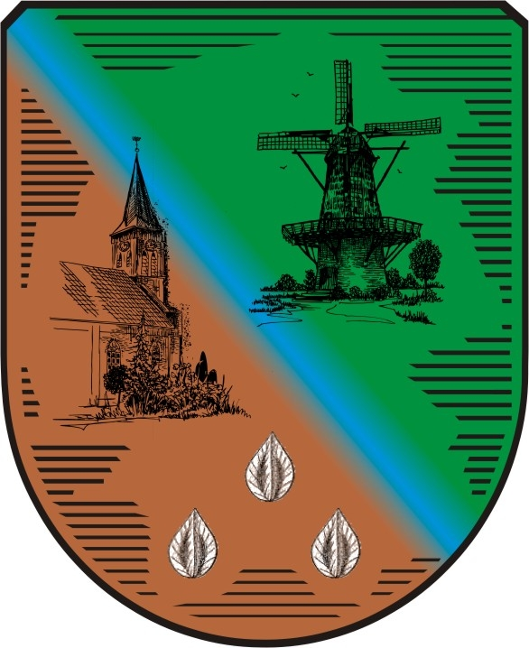 COA Georgsdorf Germany